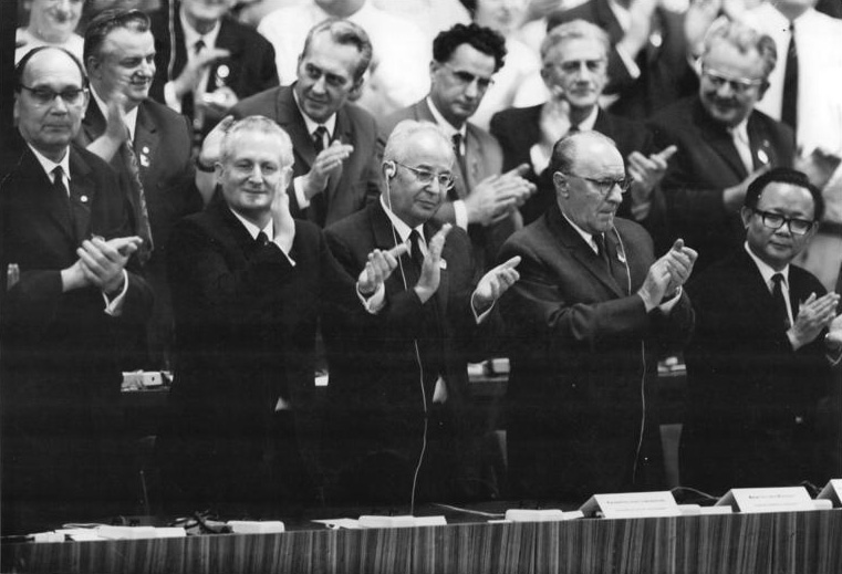 ADN-ZB Kollektiv 15-6-71-ba Berlin: VIII. Parteitag der SED-In der Berliner Werner-Seelenbinder-Halle begann heute (15.6.) der VIII. Parteitag der SED. Unser Foto zeigt in der 1. Reihe des Präsidiums (v.l.n.r.) die Mitglieder des Politbüros des ZK der SED Alfred Neumann, Günter Mittag, den Generalsekretär des ZK der KPTsch, Gustav Husak den Ersten Dekretär des ZK der USAP, Janos Kadar, und das Mitglied des Präsidiums des ZK der Nationalen Befreiungsfront Südvietnams Nguyen Van Hieu.